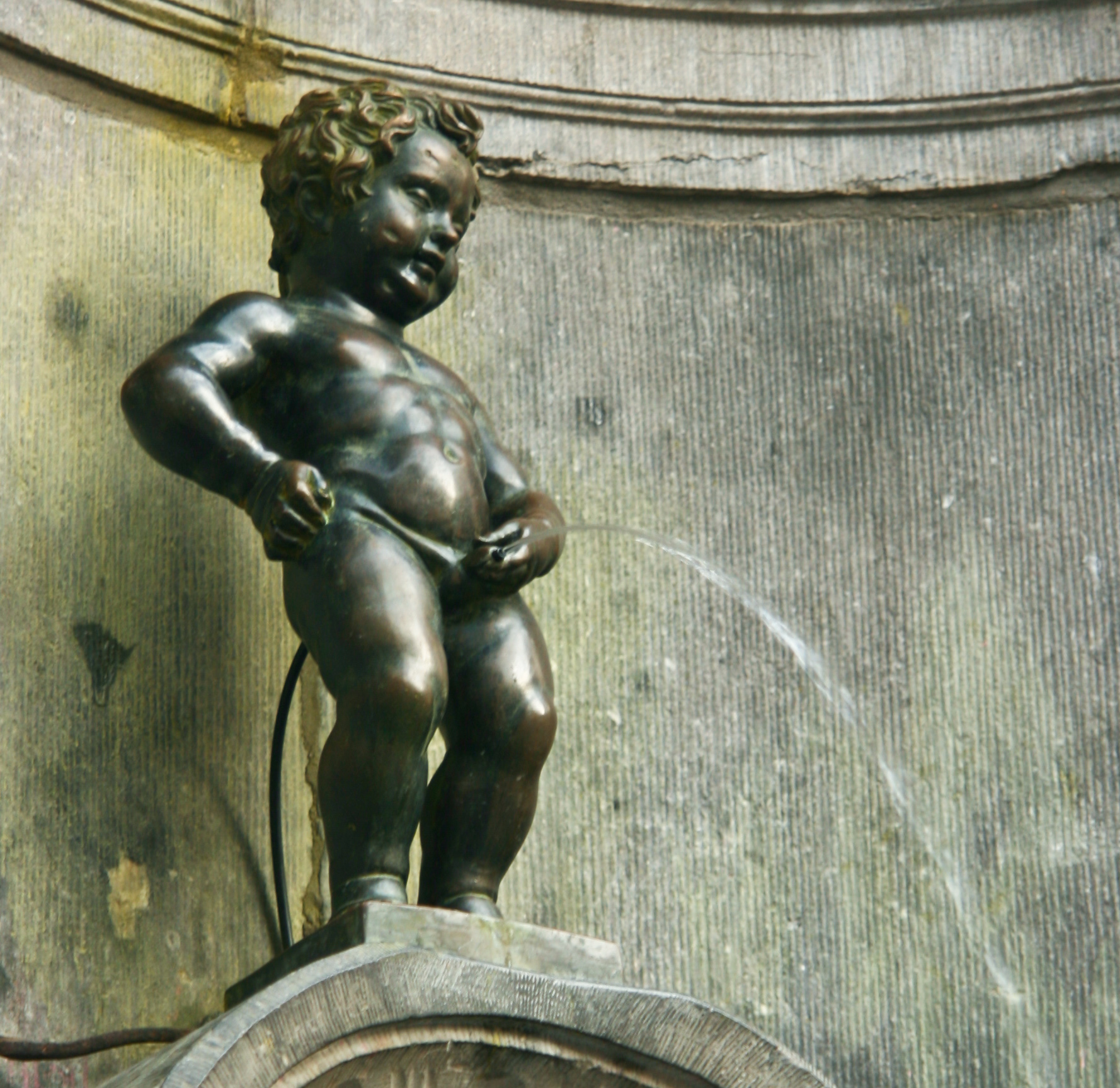 Manneken Pis.